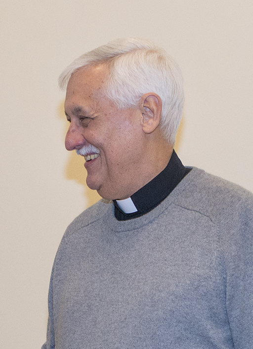 Arturo Sosa, Superior General de la Compañía de Jesús